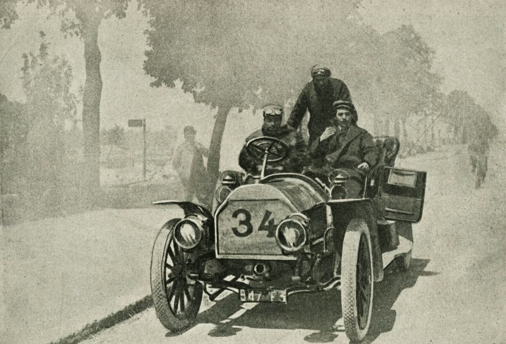 La Berliet 24 hp 1905, victorieuse alors de plusieurs épreuves françaises de tourisme - La Vie au Grand Air du 2 juin 1905, p.VIII